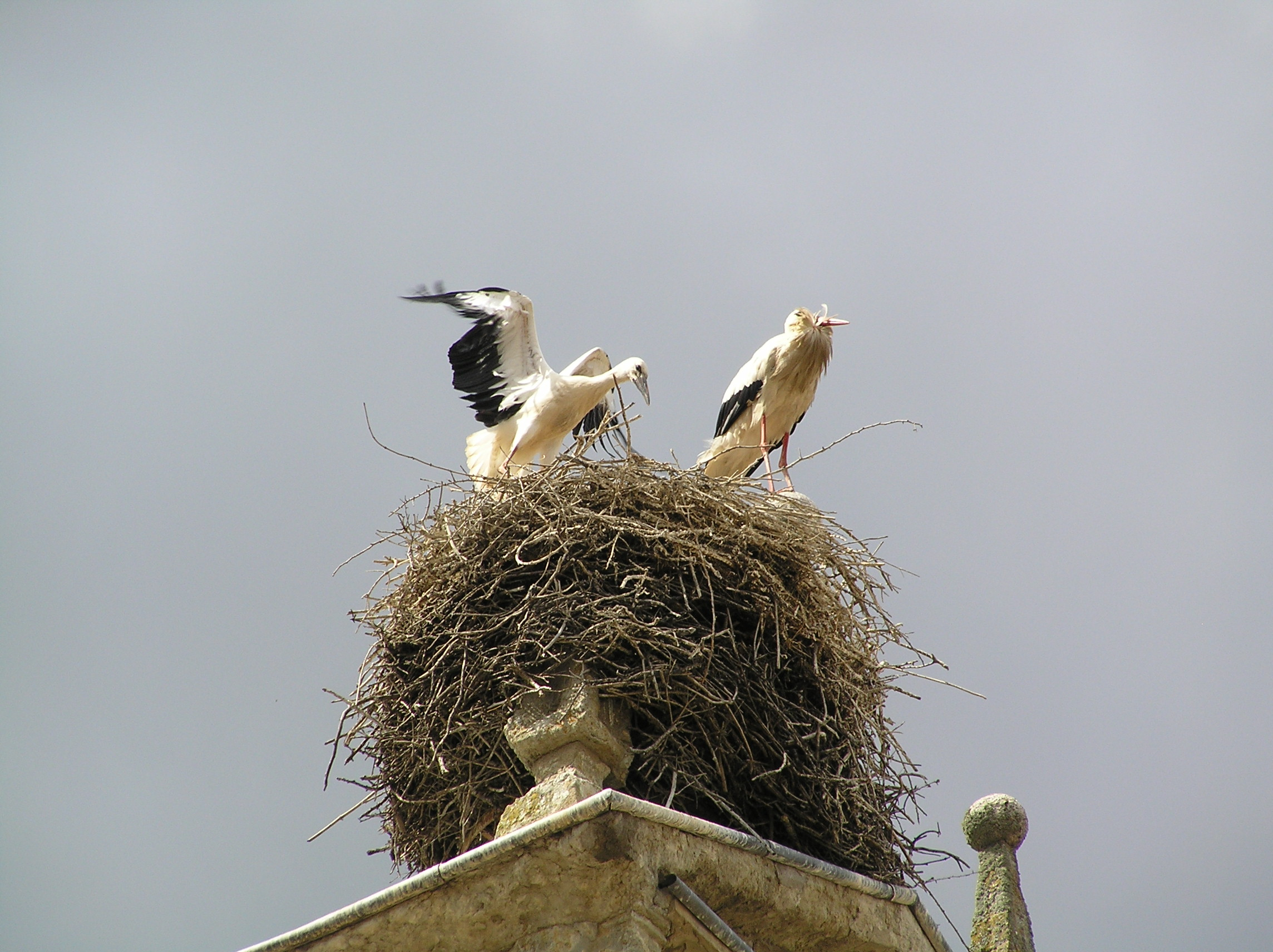 Ciconia ciconia